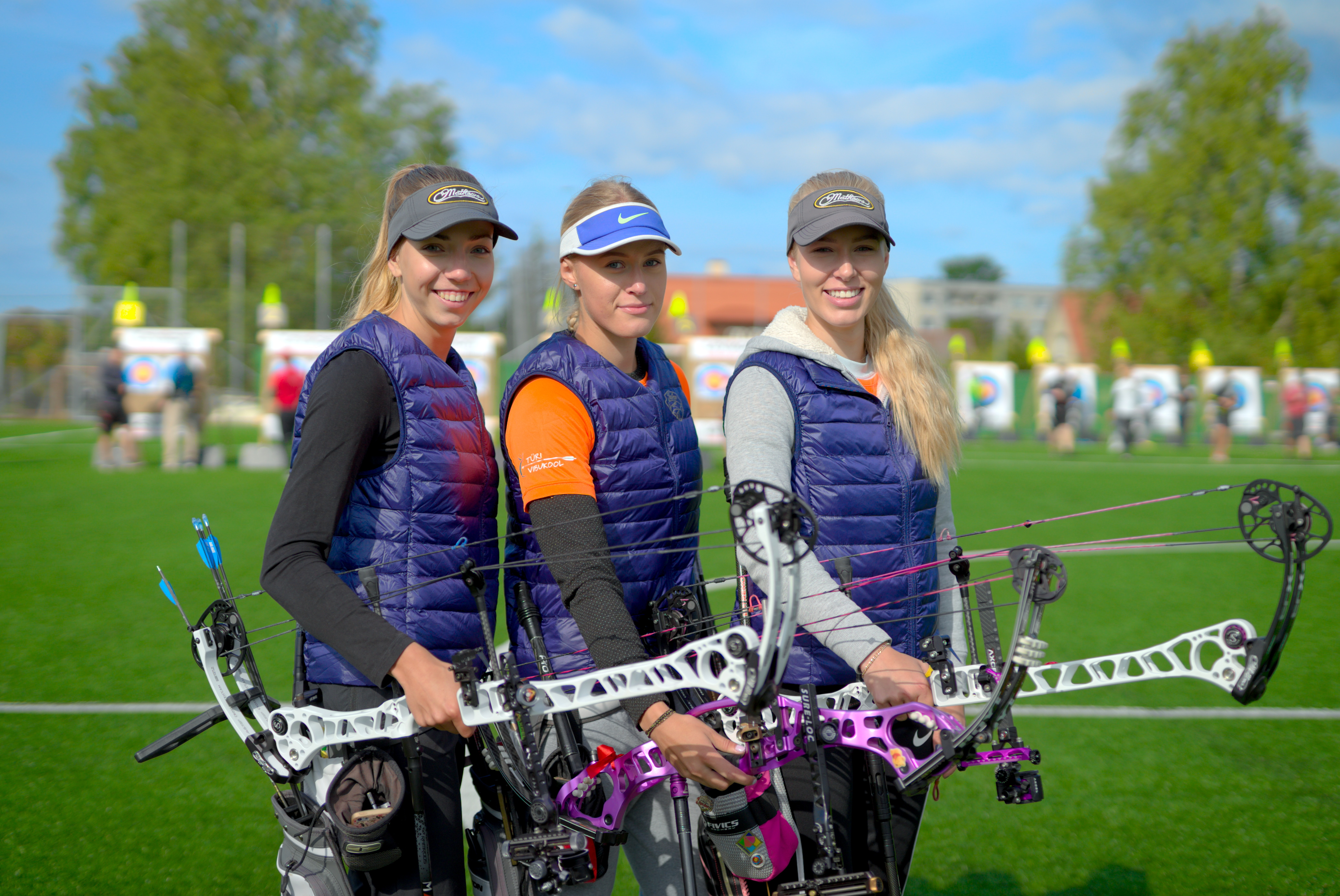 Emily Hõim, Lisell Jäätma, Meeri-Marita Paas